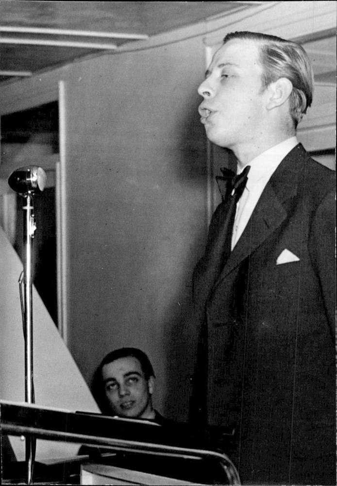 Författaren Rune Lindström talar till ungdomen i Ostermans bilhallar. Sedan den 15 mars pågår i Ostermans bilhallar vid Birger Jarlsgatan en serie kristna ungdomsmöten, som kväll efter kväll fyller de jättelika lokalerna till sista plats. Det är komminister Nils Bolander som kyrkoadjunkt Anders Frostenson som leda dessa möten.